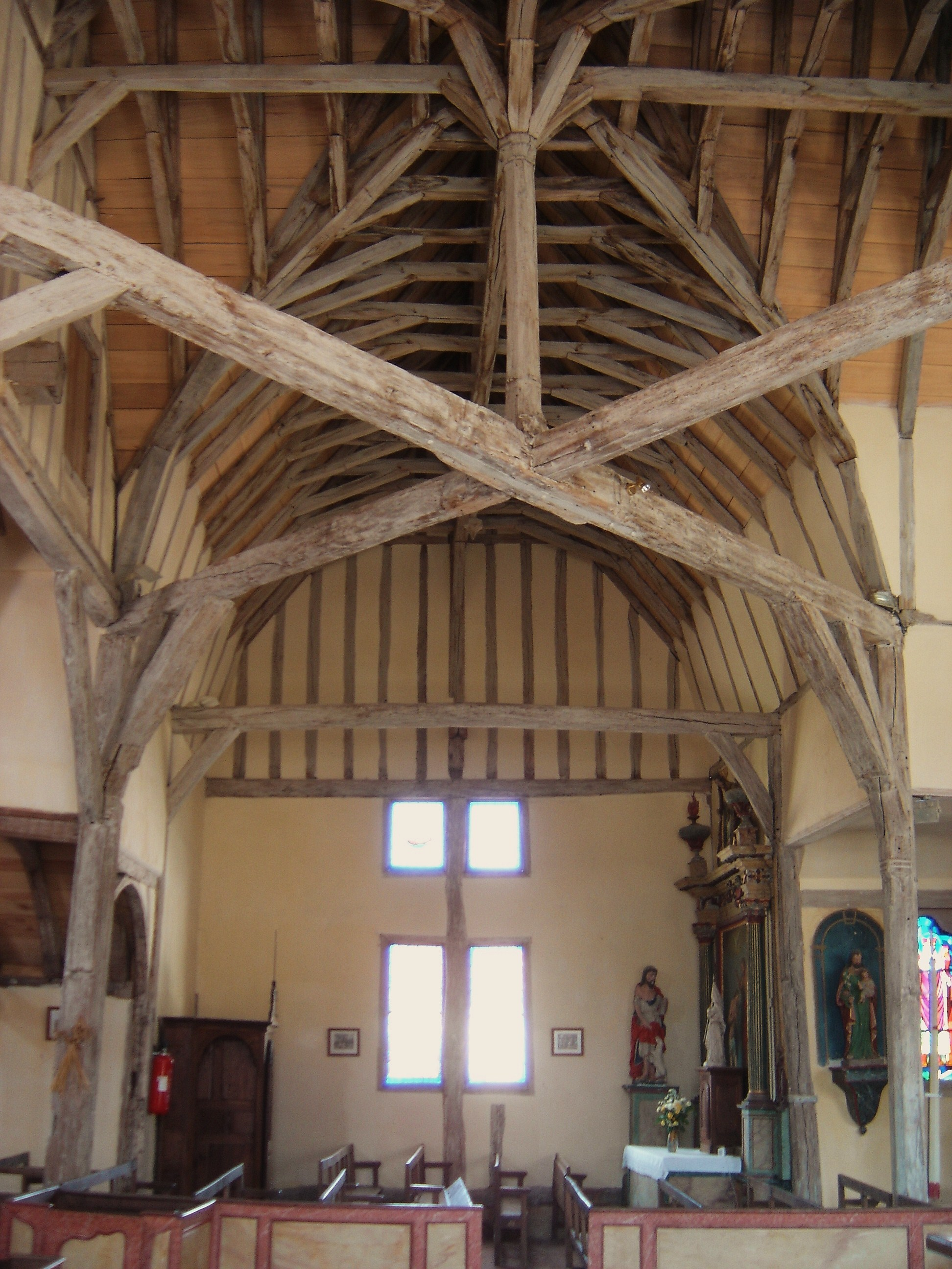 Intérieur (et charpente) de l'église de Longsols (Aube, Champagne, France)